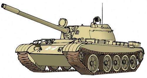 Ugandan AMISOM T-55